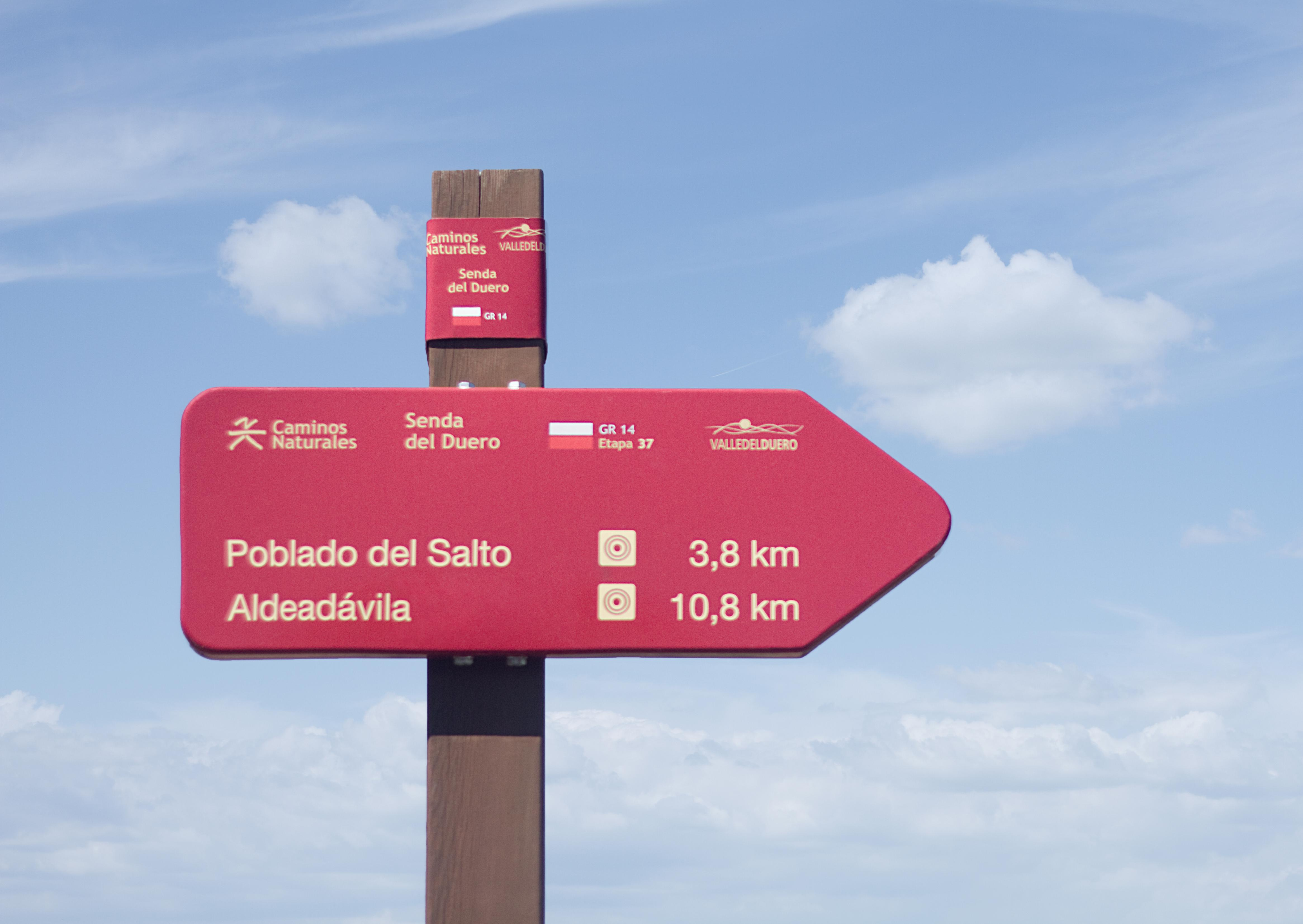 Señal del GR-14 a su paso por Mieza, en el Parque Natural de Arribes del Duero, España.